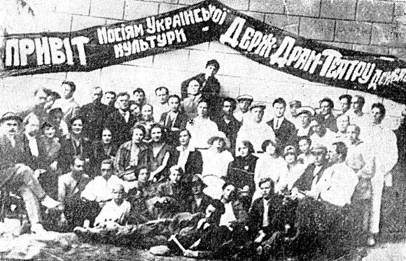 Дондерждрама: Фото